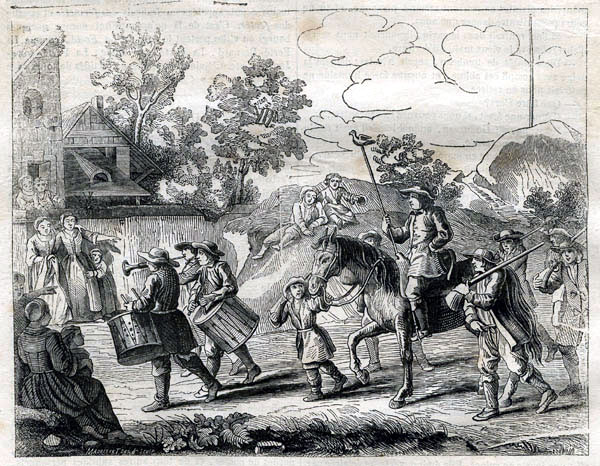 La légende de l'illustration mentionne: "Anciennes coutumes en France - Retour du vainqueur au Jeu de Papeguay, d'après un dessin du siècle dernier par Mariette"